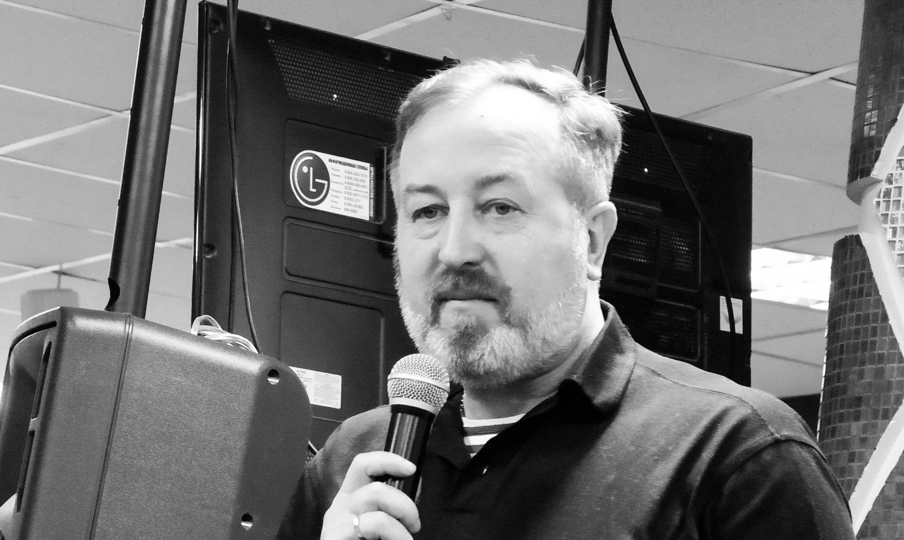 Валентин "Атаман" Иванович Мотузенко